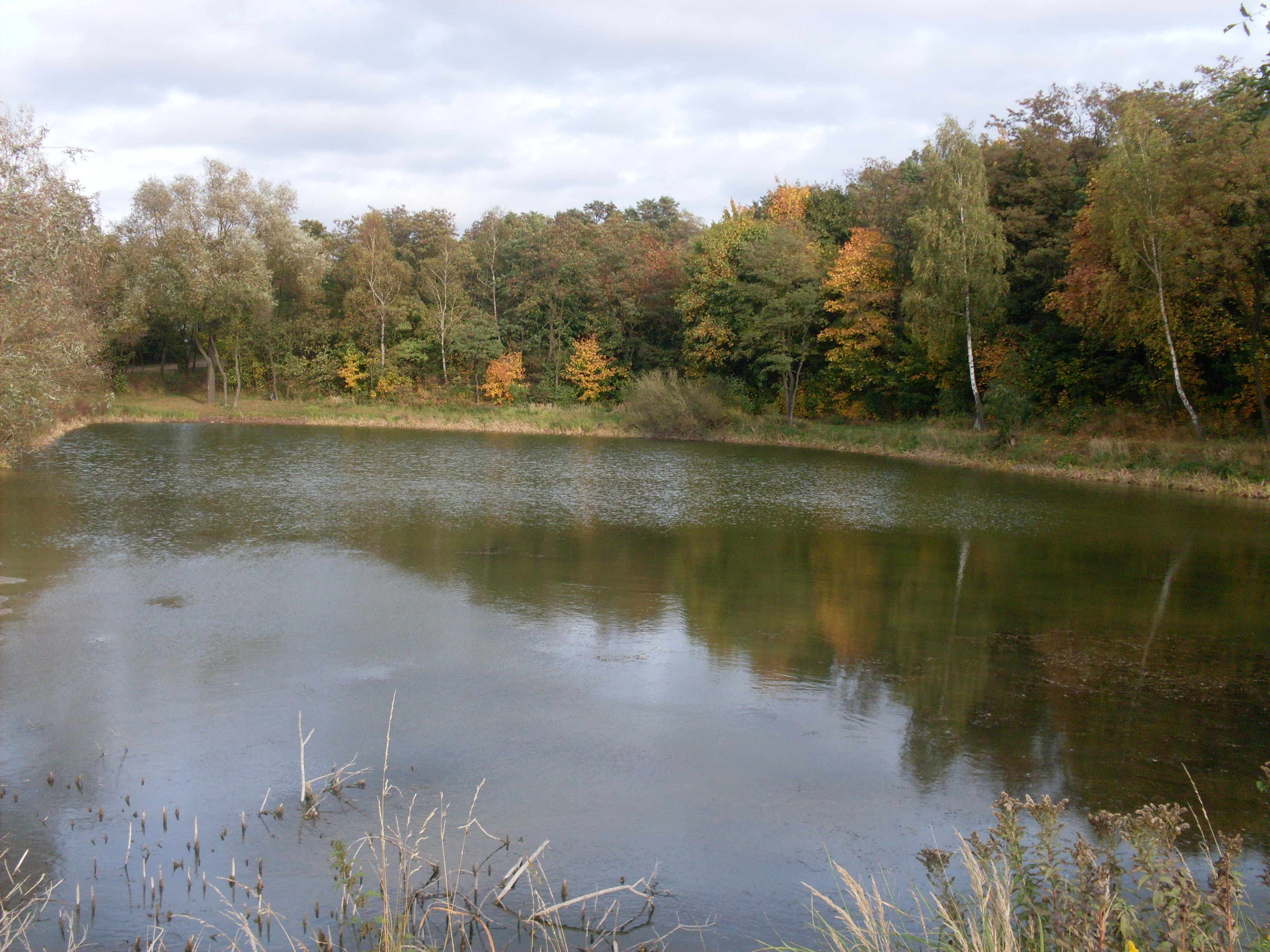 Staw w wyrobisku dawnego kamieniołomu. Miękinia